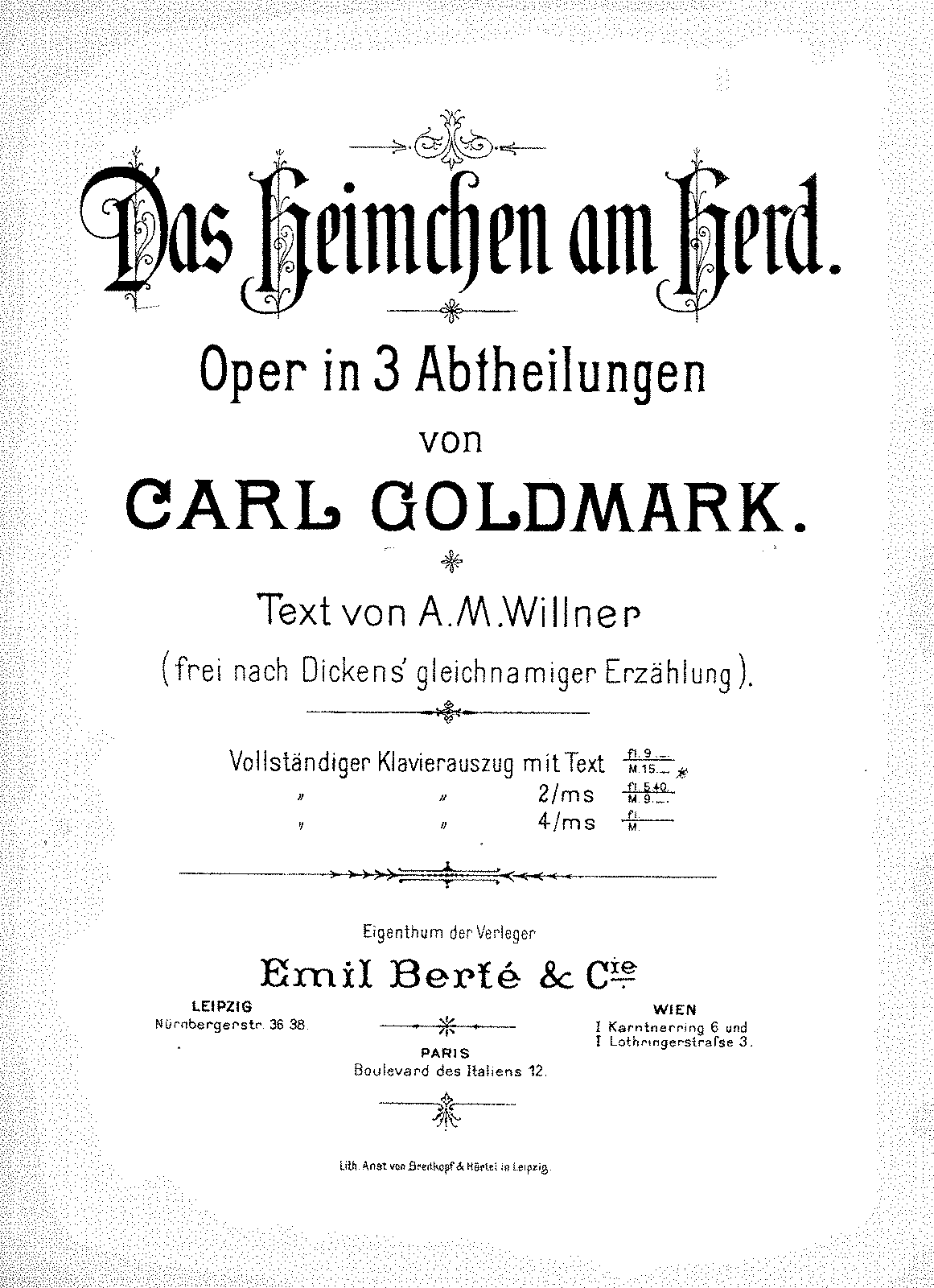 A házi tücsök első kiadásának címlapja.